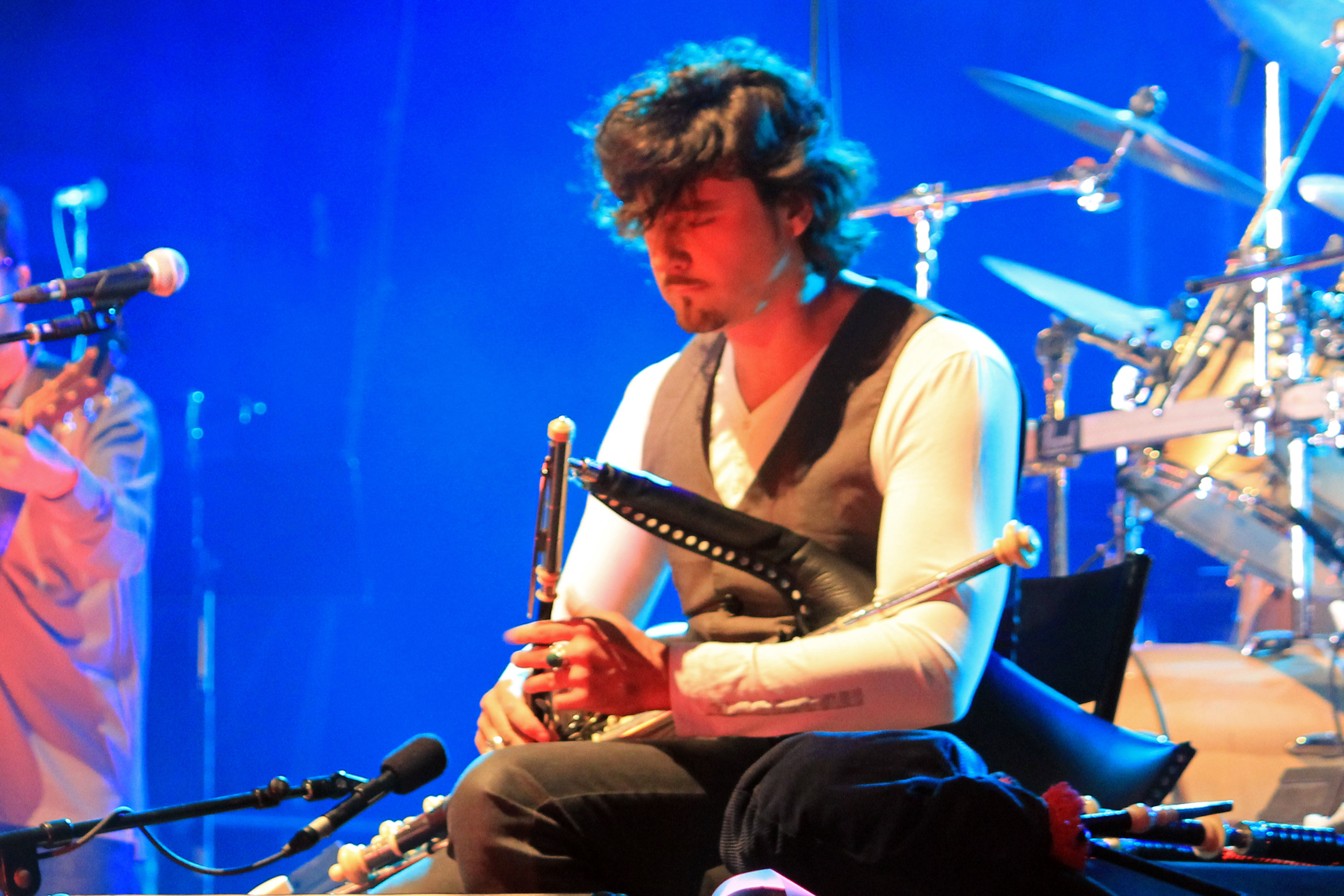 Ronan Le Bars aux uilleann pipes lors de du concert inaugural de la tournée liée à la promotion de l'album Celebration de Dan Ar Braz au Festival Interceltique de Lorient 2012.